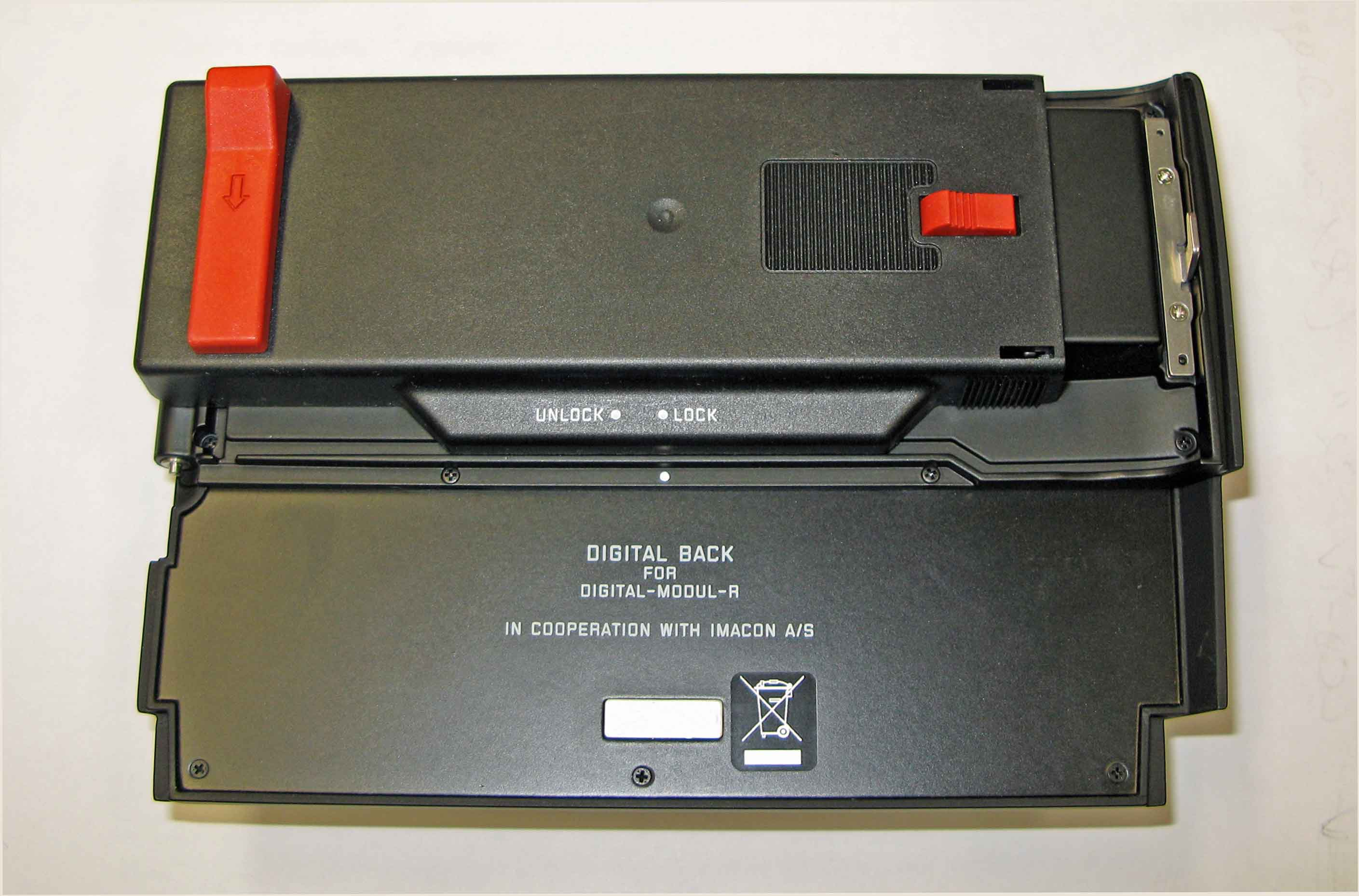 De Leica Digital Modul bannen